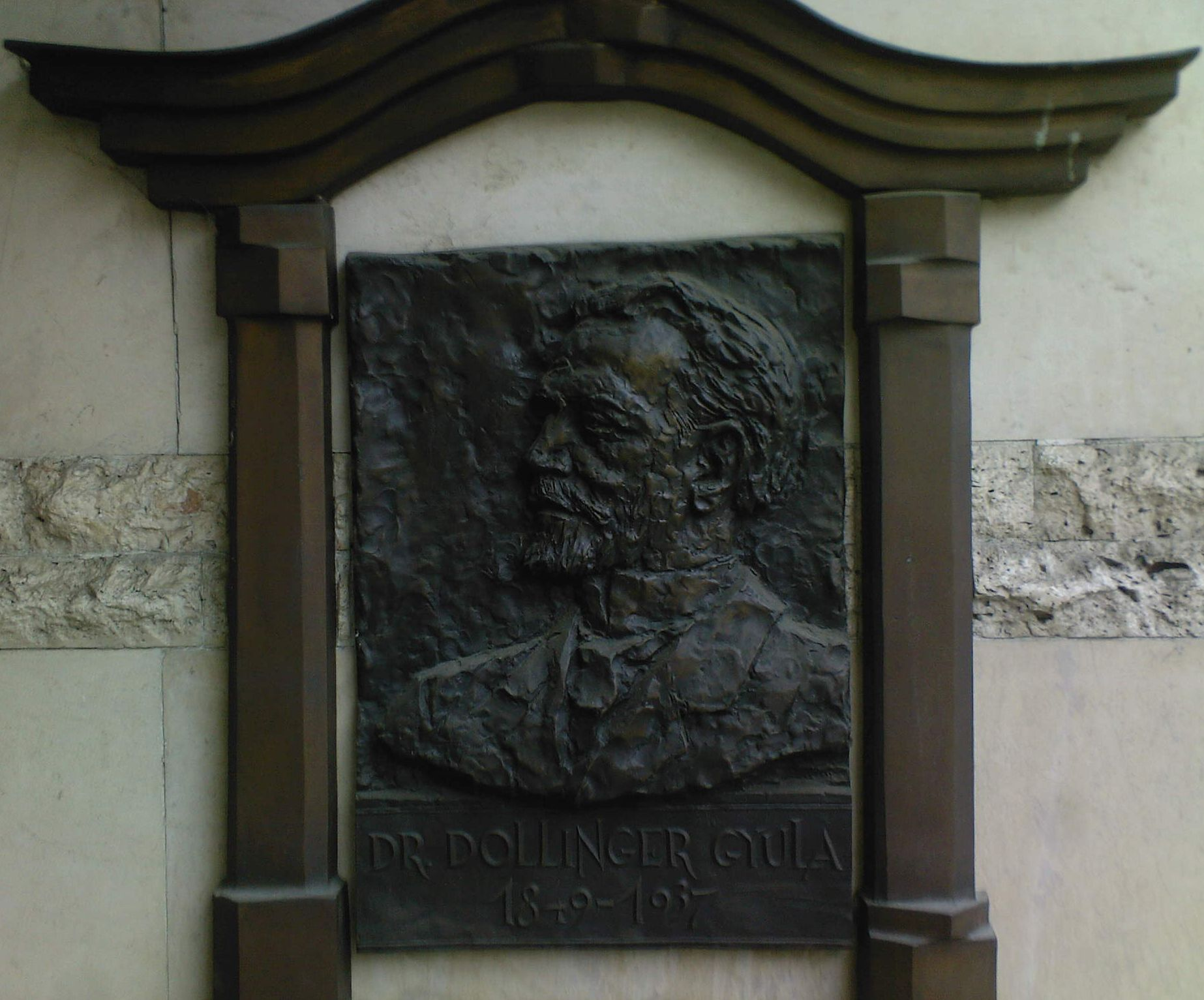 Budapest, XII. kerület, Dollinger Gyula (1849–1937) sebész, egyetemi tanár, a magyarországi orthopédia megalapozója domborműve. Szöllőssy Enikő (*1939) alkotása (1993)